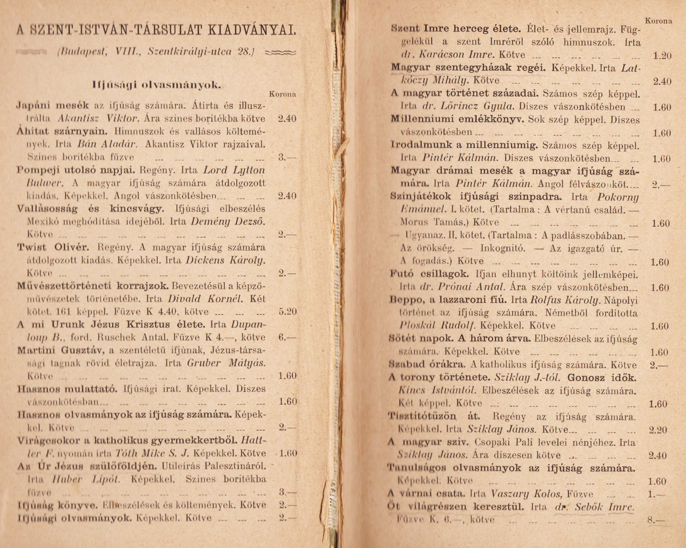 A Szent István Társulat kiadványai, hirdetés In: Prónai Antal Szavalókönyv